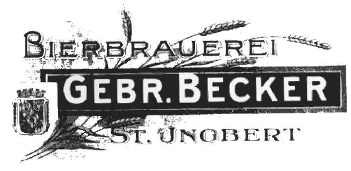 Nachbau Logo nach Glasmotiv